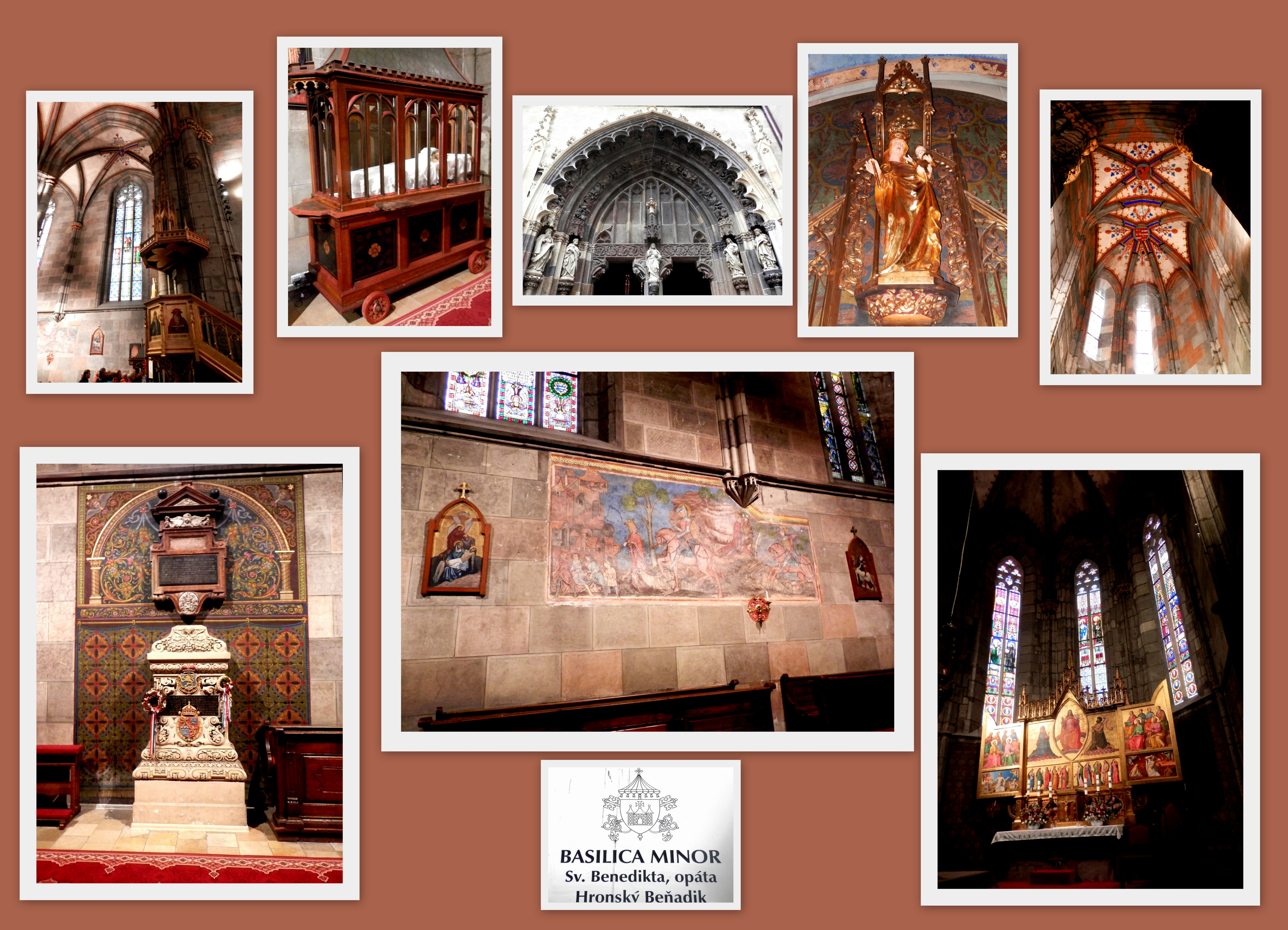 Pohľadnica, interiér baziliky v Hronskom Beňadiku. Slovensko.